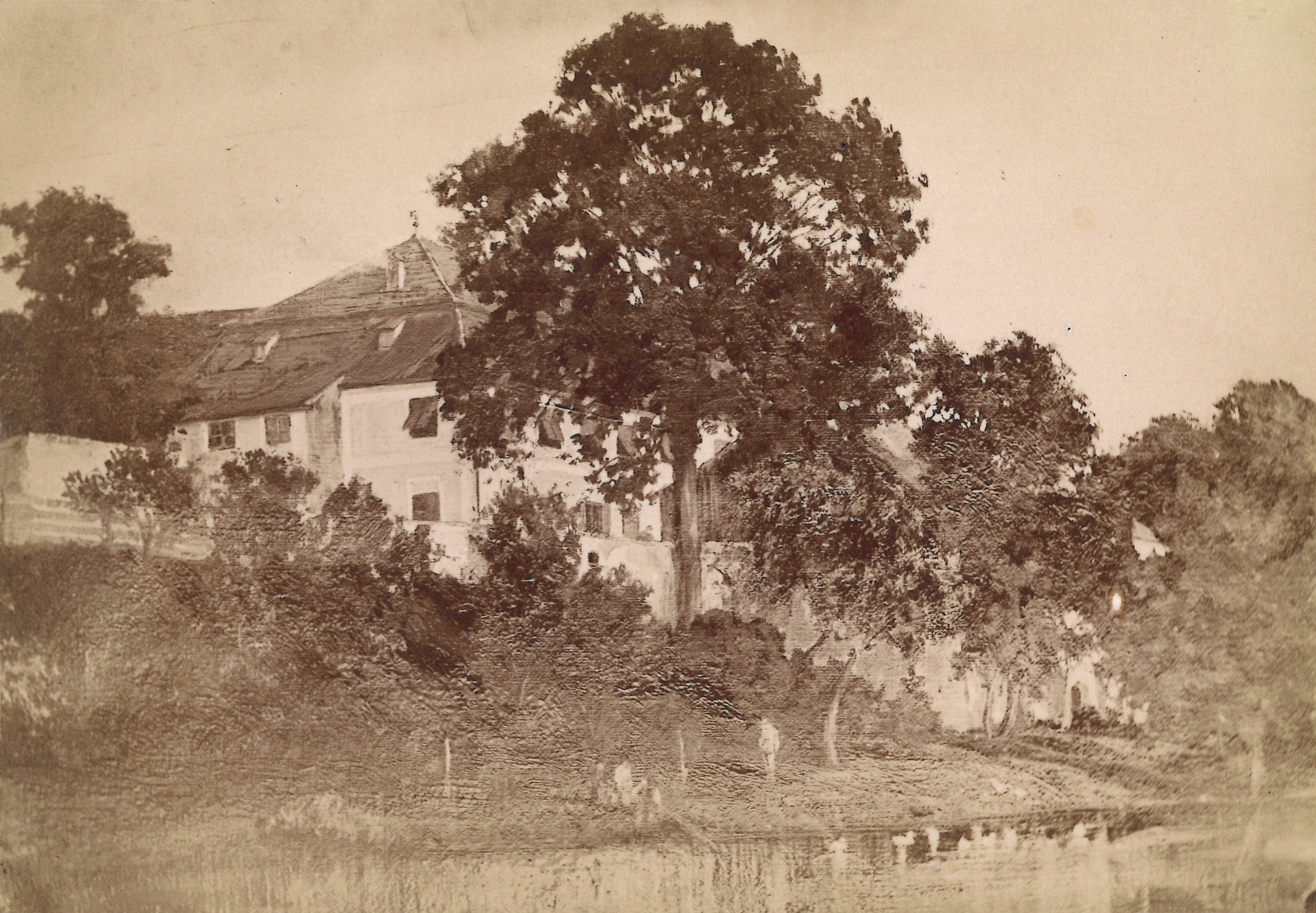 Gut Osternberg bei Braunau, Wohnsitz des Malers Hugo von Preen. Im Vordergrund die Enknach. Fotografie auf Karton; Cabinet-Portrait J.F. Klinger, Braunau am Inn. Handschriftlicher Vermerk unter dem Bild "Osternberg im Innviertel. Besitz Preens". Das Gut Osternberg wurde 1970 von der Stadtgemeinde Braunau gekauft und im Dezember 1972 abgebrochen. An seiner Stelle wurde die HTL Braunau errichtet.